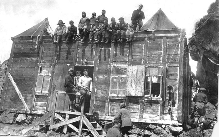 Первая хижина Приют одиннадцати на Эльбрусе. Фото 1932 года